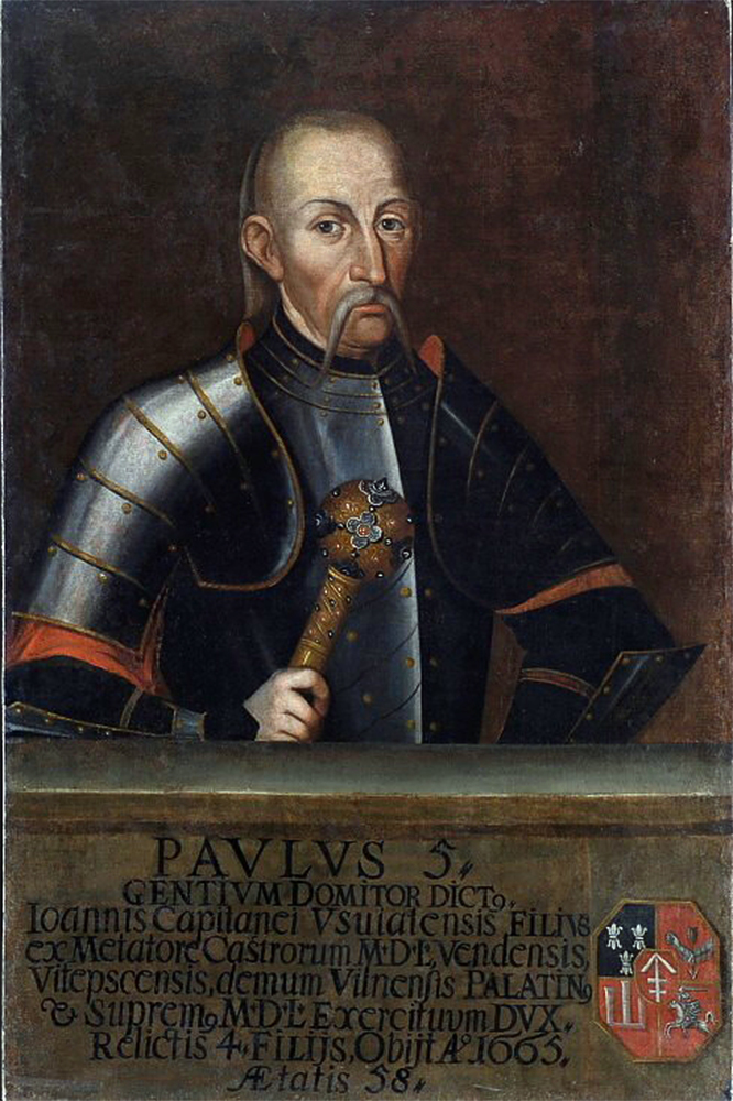 Беларуская (тарашкевіца): Партрэт Паўла Яна Сапегі (Pavał Jan Sapieha)